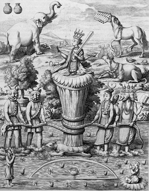 Quirlung des Milchmeeres